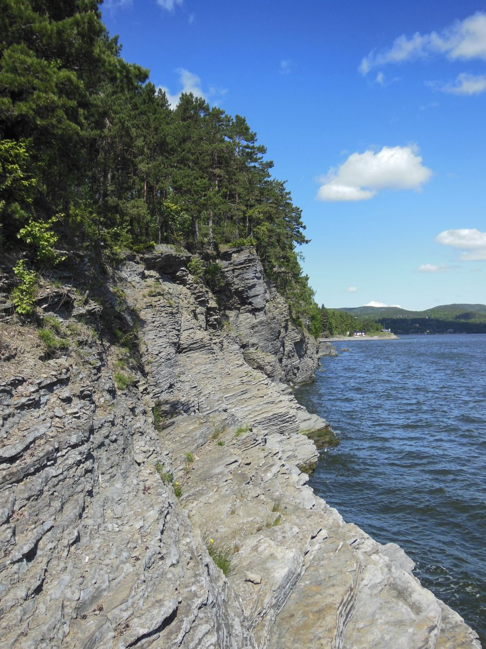 På Bjørkøya er de fossilførende lagene svært tydelige.